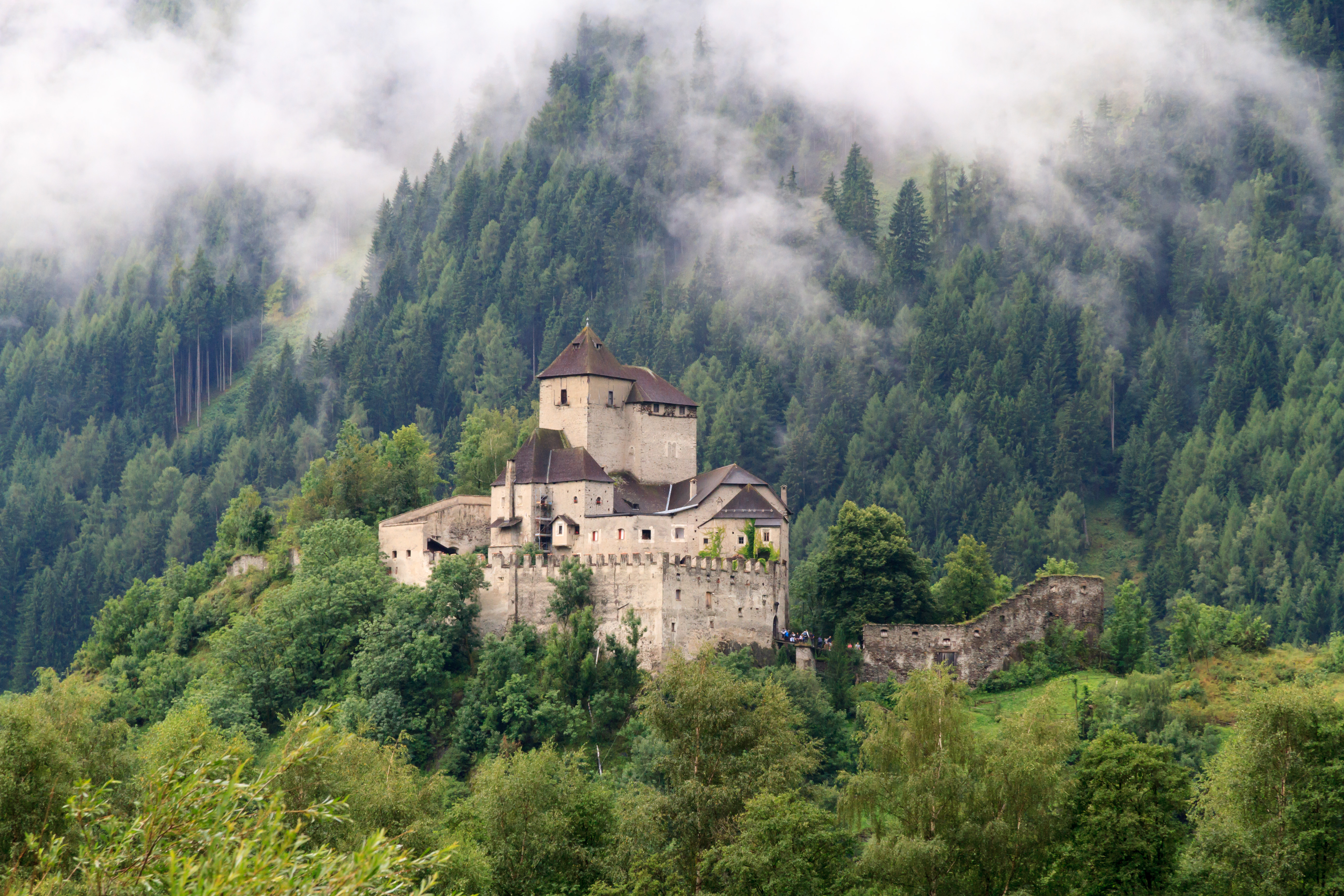 Burg Reifenstein